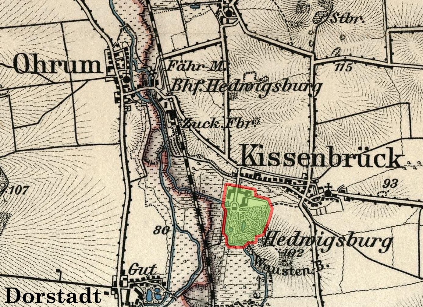 Karte des Deutschen Reichs 1:100.000 Blatt 312 Wolfenbüttel (Ausschnitt durch den Benutzer mit Markierung des Ritterguts Hedwigsburg)